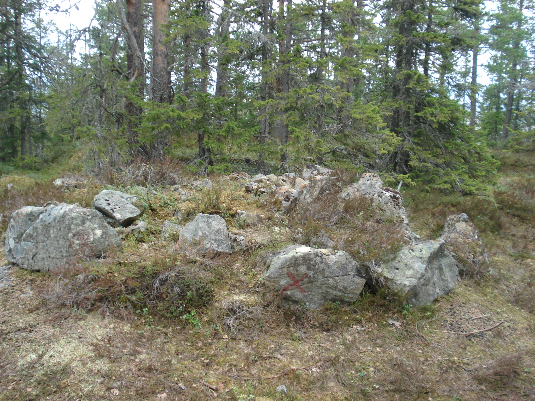 Våttå fra vikingetida, Tiller